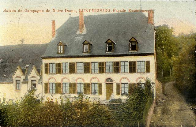 D'Schlass Eesebur "Maison de campagne Notre-Dame". This JPG graphic was created with GIMP.